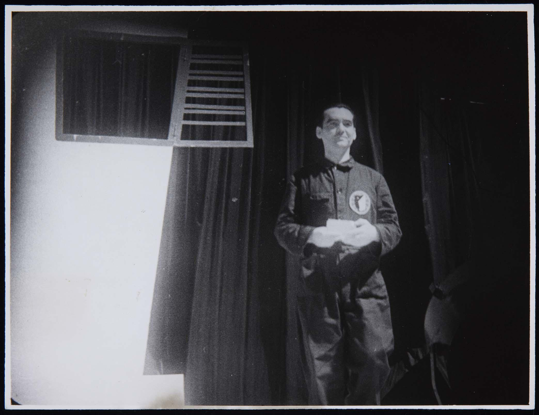 Federico García Lorca leyendo un texto antes de la representación por La Barraca de «La guarda cuidadosa», de Miguel de Cervantes (Almazán, Soria) (julio de 1932). Fotografía anónima. Colección del Museo Nacional Centro de Arte Reina Sofía, Madrid, España